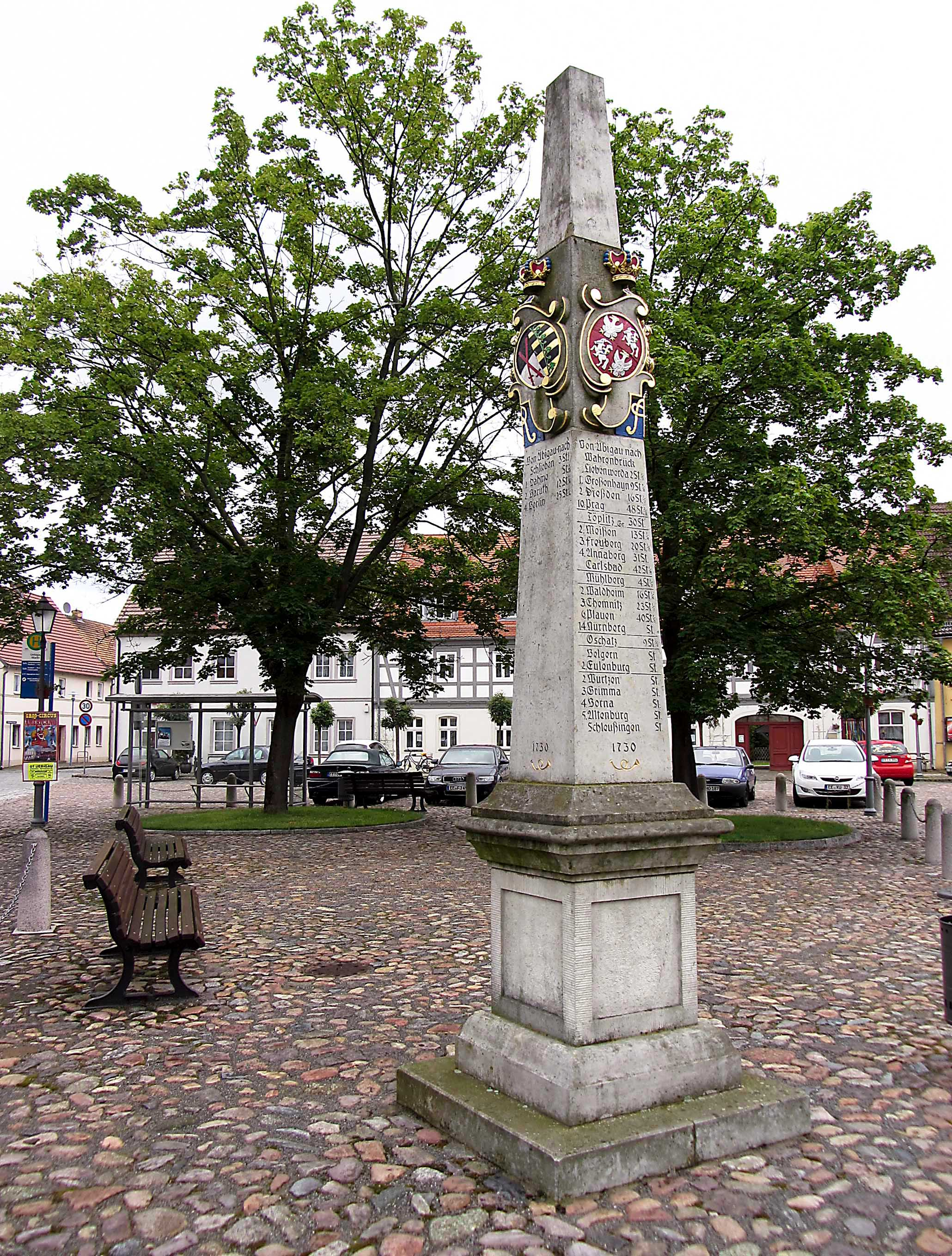 Kursächsische Postmeilensäule-Distanzsäule in Uebigau Falkenberg/Elster